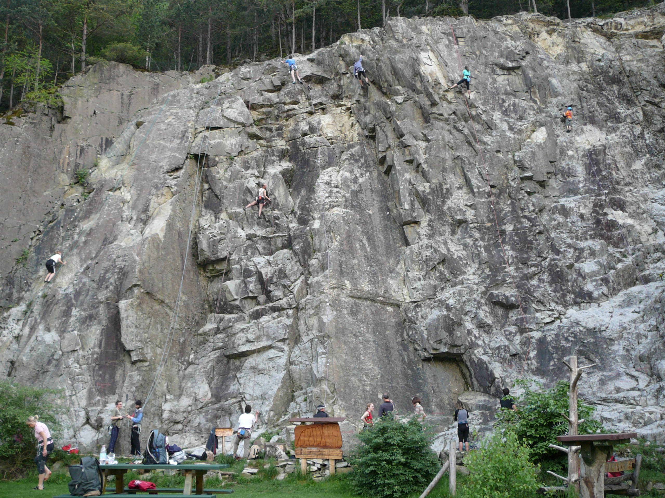 La palestra naturale di roccia a Fortezza